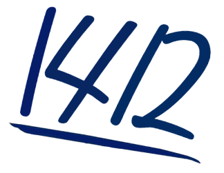 명탐정 코난의 등장인물. 괴도 키드의 코드명 1412